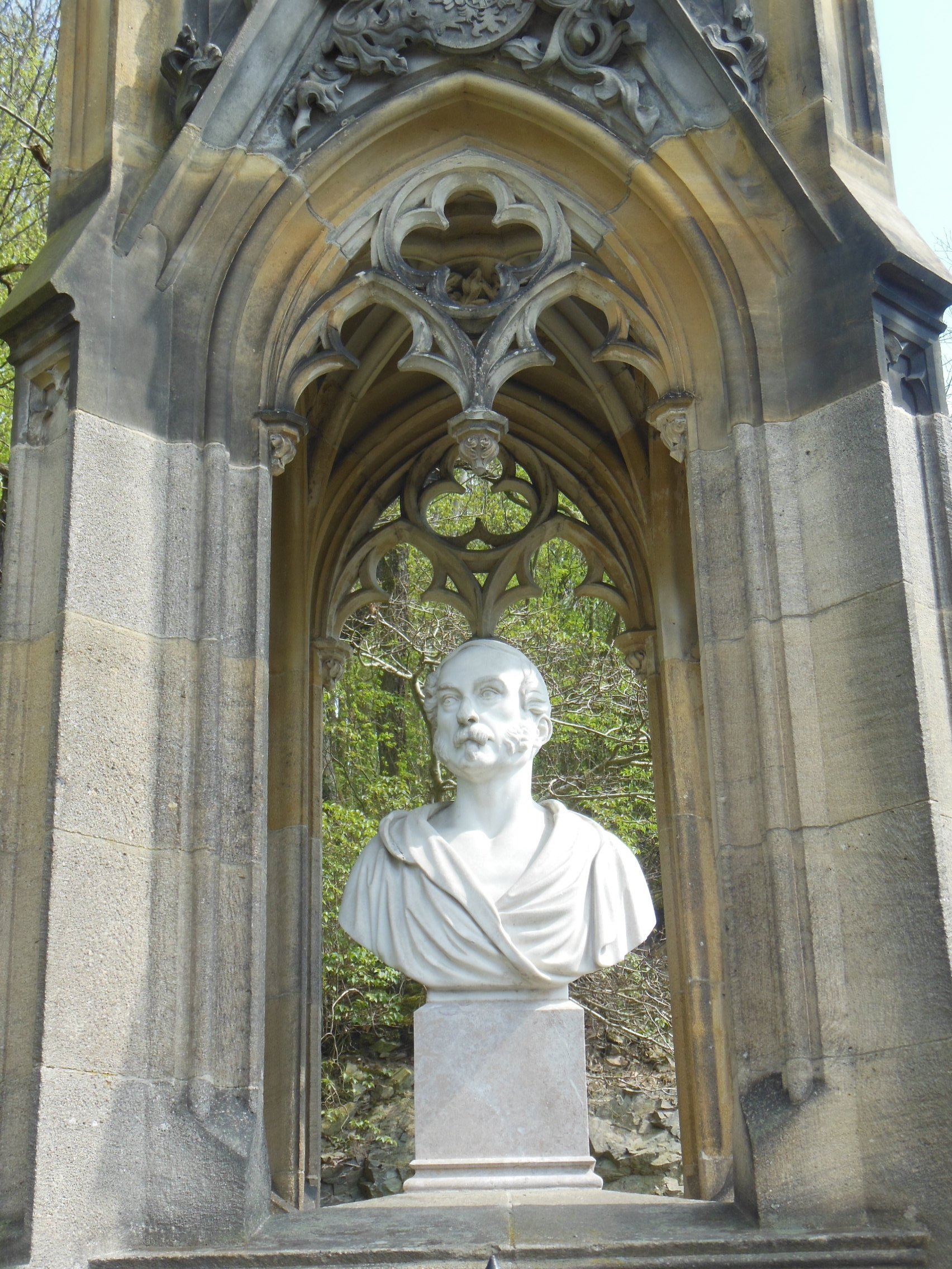 Křivoklát (okres Rakovník). Pomník Karla Egona II. Fürstenberga